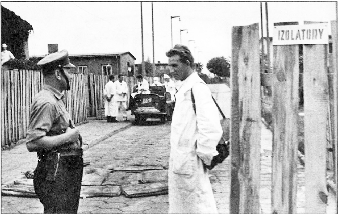 Ospa we Wrocławiu 1963